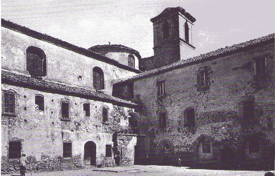 Il chiostro dell'Abbazia negli anni '20